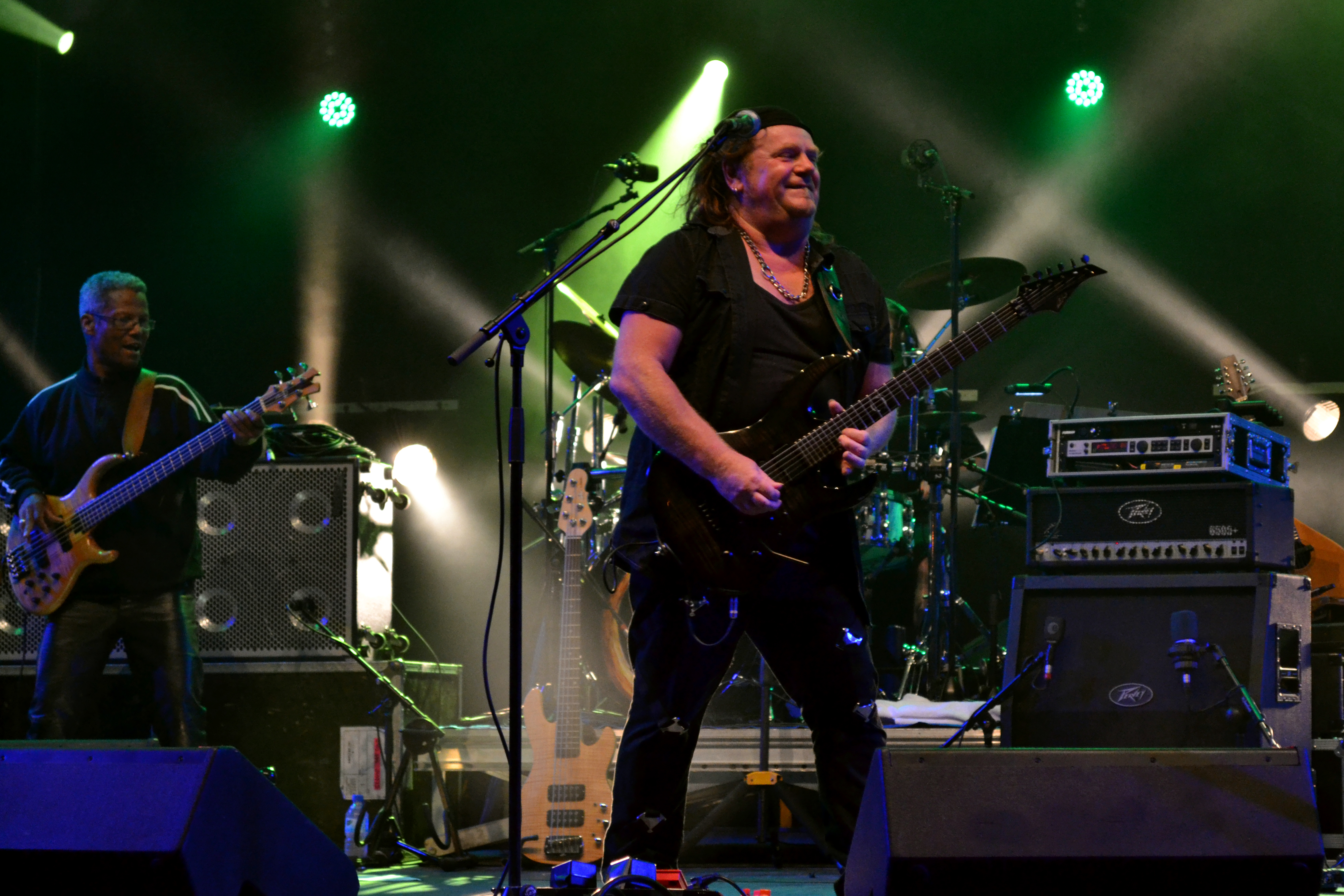 Pat O'May en concert au festival de la Saint-Loup à Guingamp le 12 août 2013.